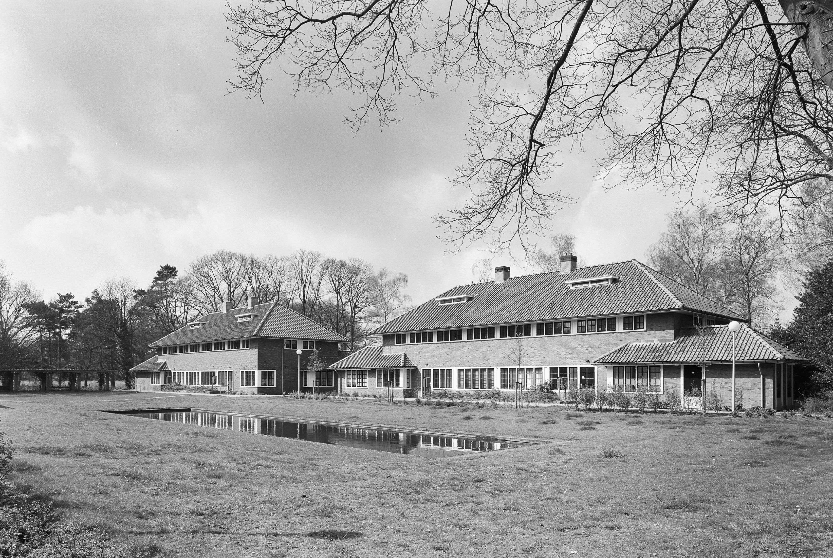 Overzicht zusterhuizen (opmerking: GB De Utrechtse Heuvelrug)